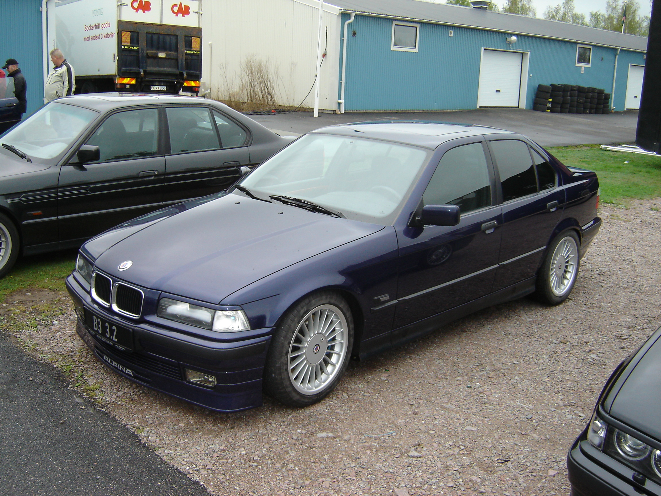 BMW Alpina B3 3.2